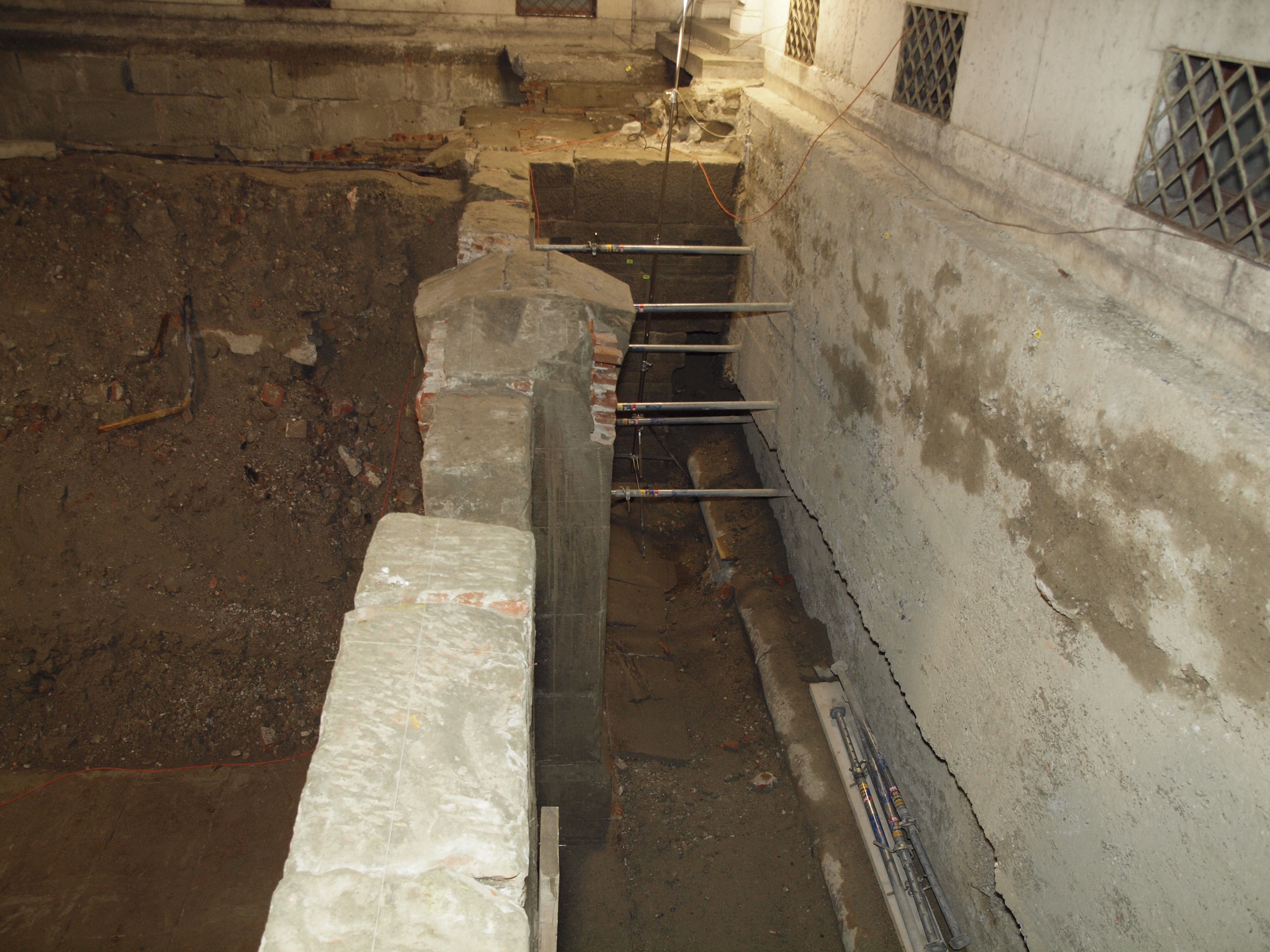 Bilder von der öffentlichen Führung duch die Ausgrabungen beim Bundeshaus Ost in Bern. Die Ausgrabung bringen die Reste des (Wein-)kellers des alten Inselspital zu Tage